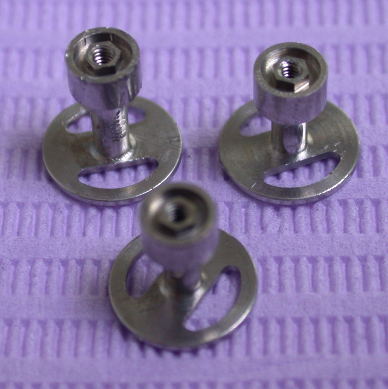 Implant titane à insertion latérale